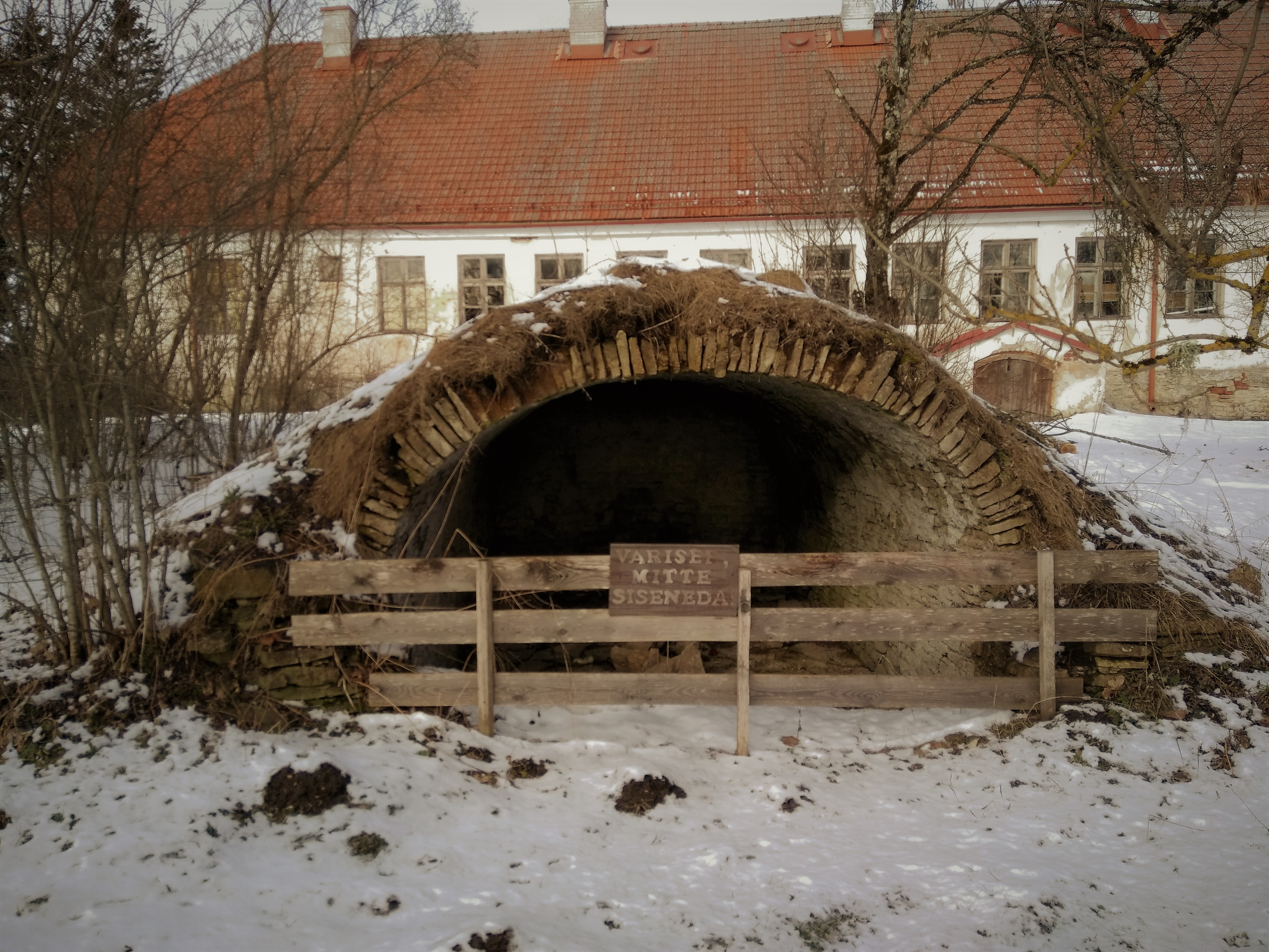 Koonga mõis. Võlvkeldri vare mõisahoone edelakülje ees.